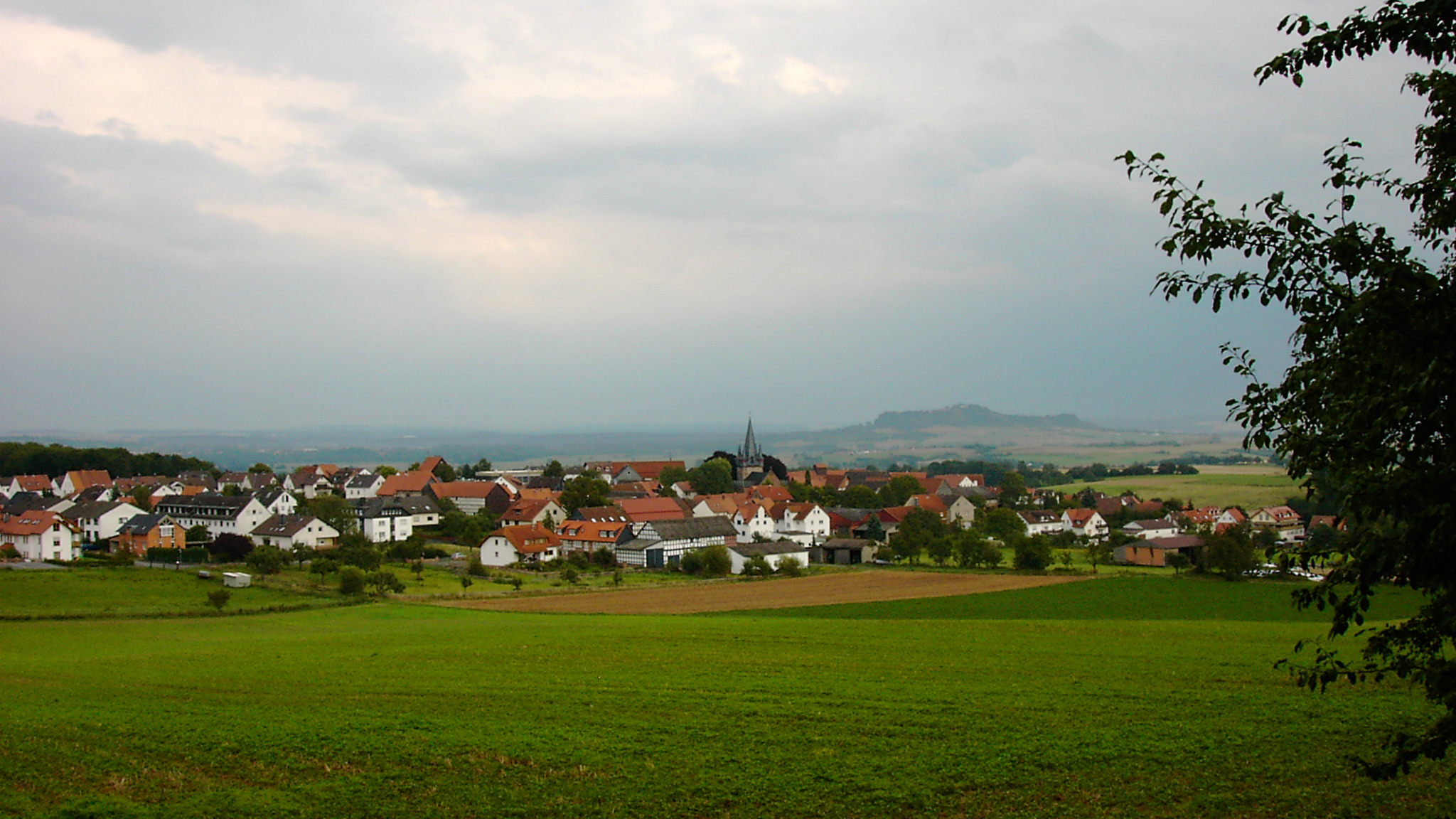 Marburg-Bauerbach mit Amöneburg im Hintergrund